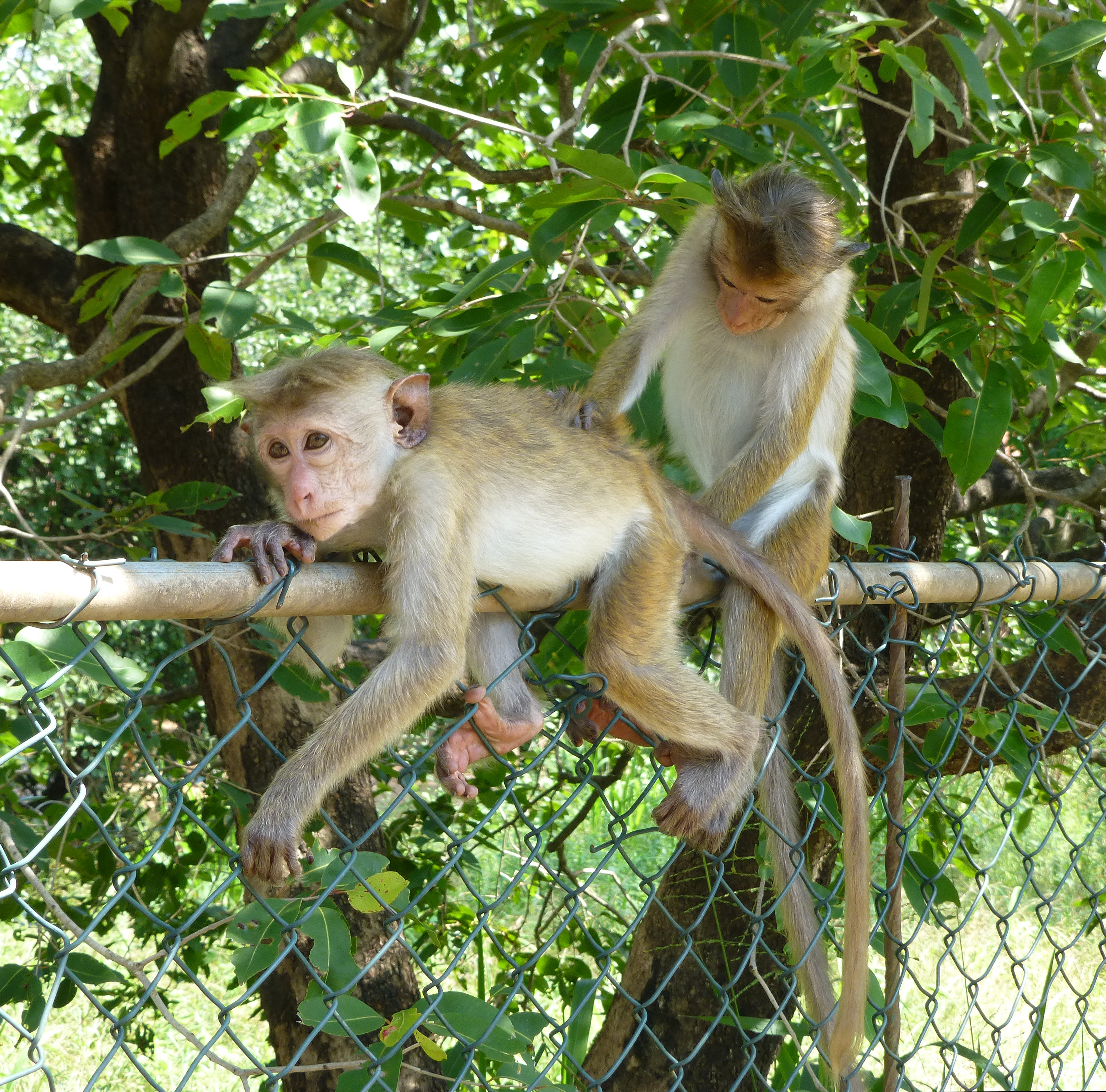 Macaques à toque (Macaca sinica), perchés sur un grillage à Dambulla (Sri Lanka)